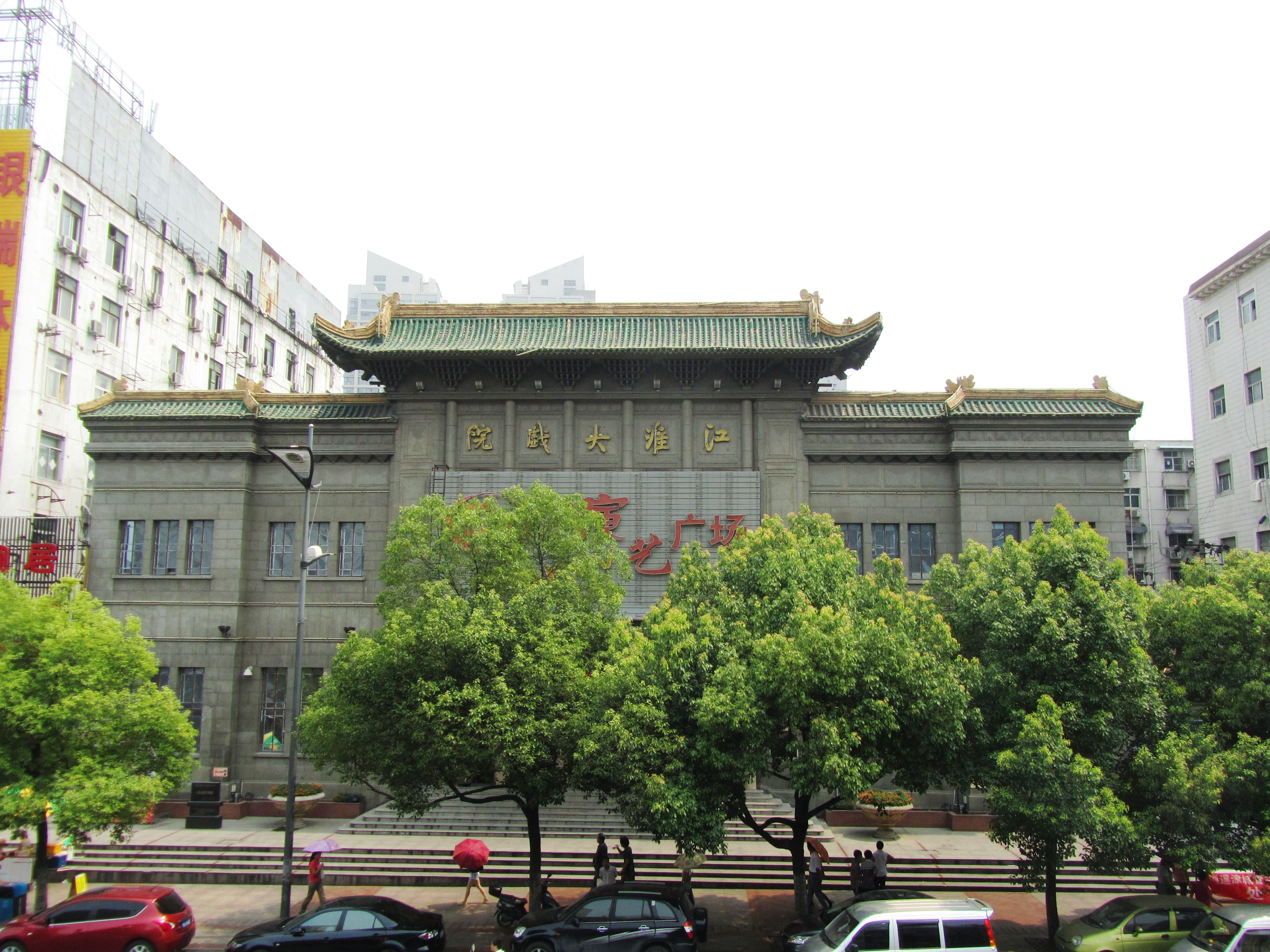 合肥淮河路中段江淮大戏院，自对面俯瞰。